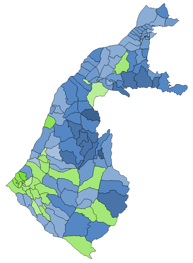 顏色對照表